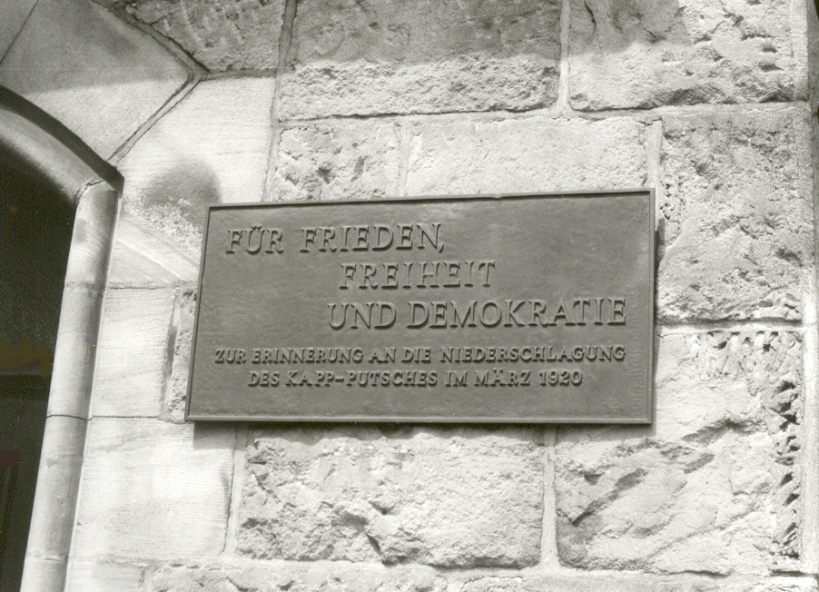 Gedenktafel am Bahnhof der Stadt Wetter (Ruhr), Deutschland